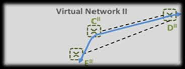 Монгол: Зураг 1 : Spatial Separtion